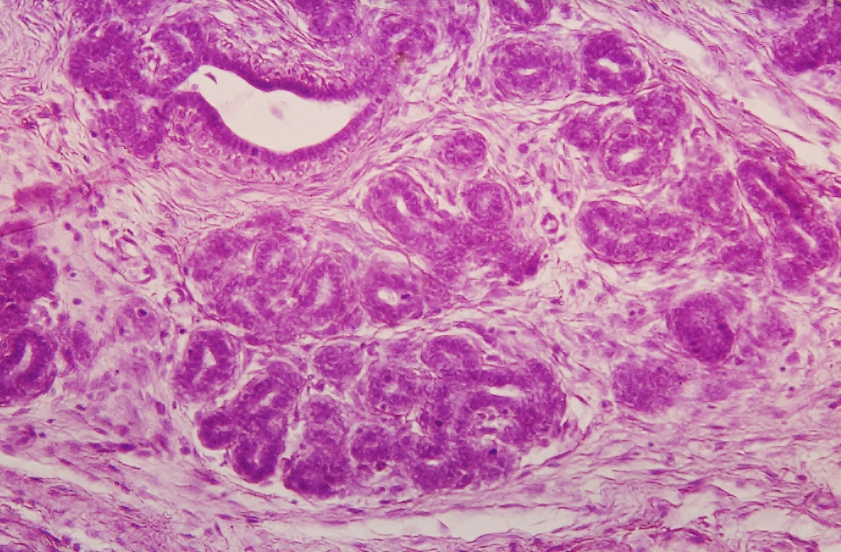 Milchdrüse: Glandula mammaria proliferans